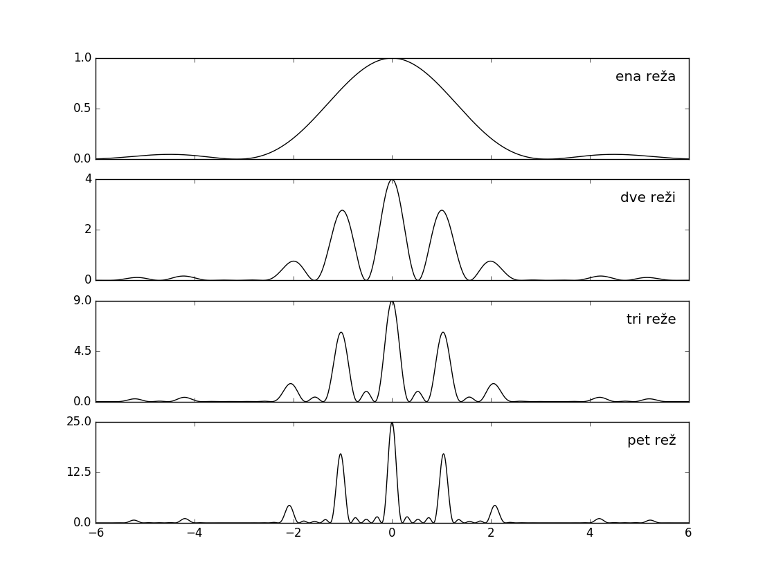 Model uklona več rež v Frauhoferjevi sliki